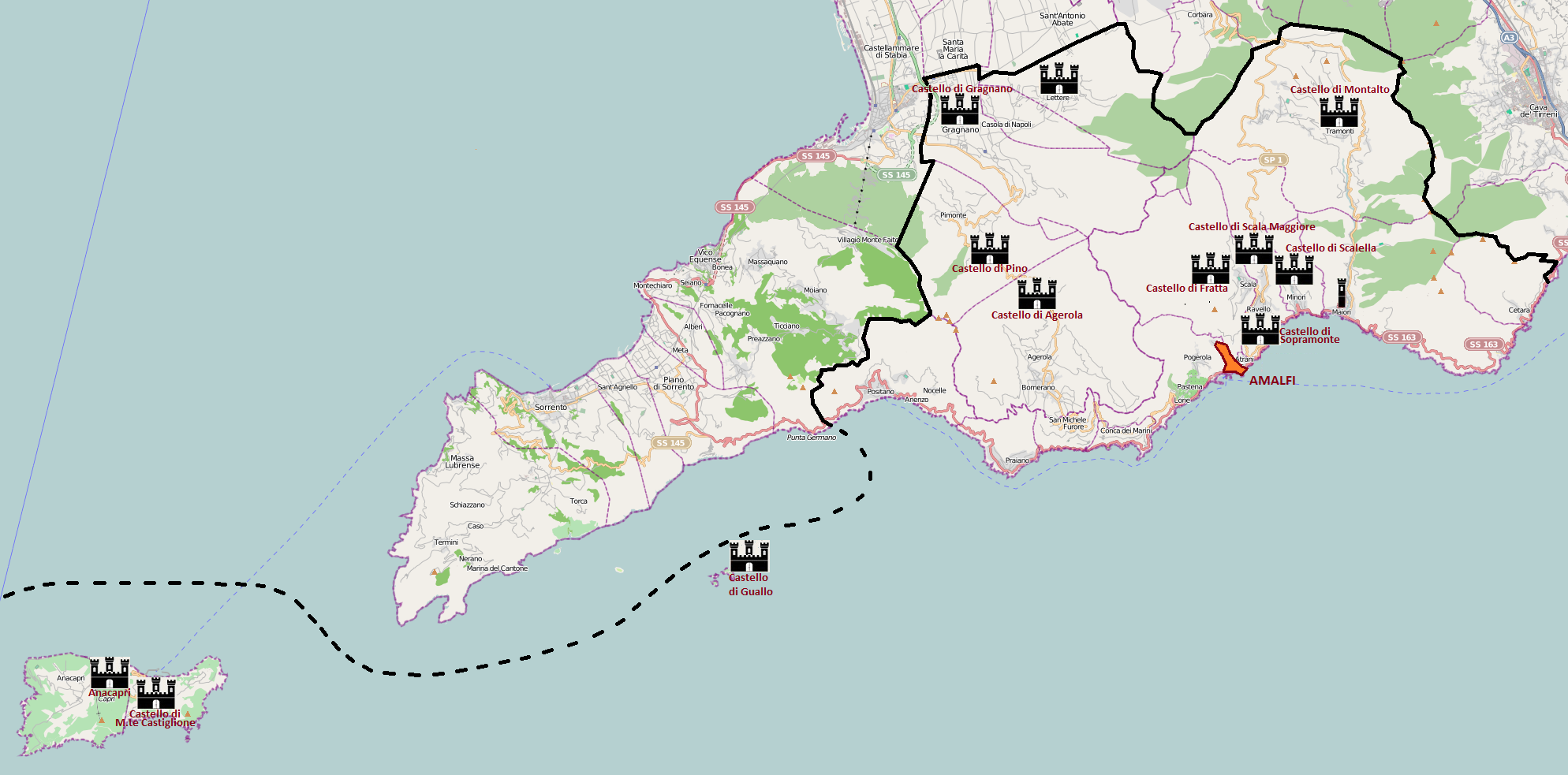 Repubblica di Amalfi nel momento della massima espansione, con confini e castelli